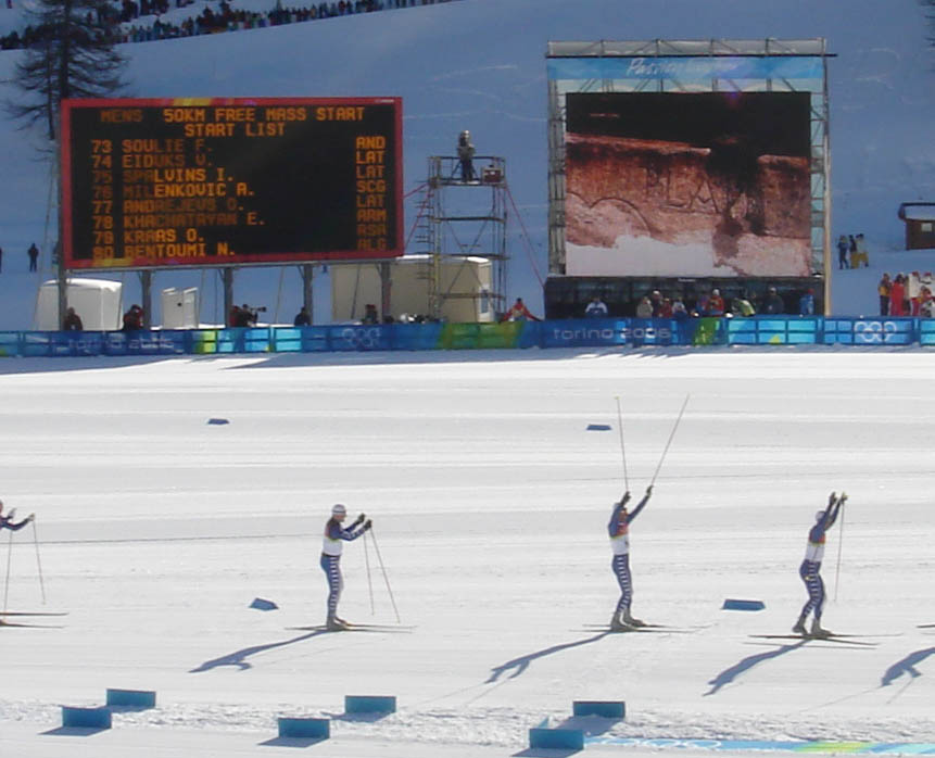 JO de 2006 Turin avec les resultat de Bentoumi